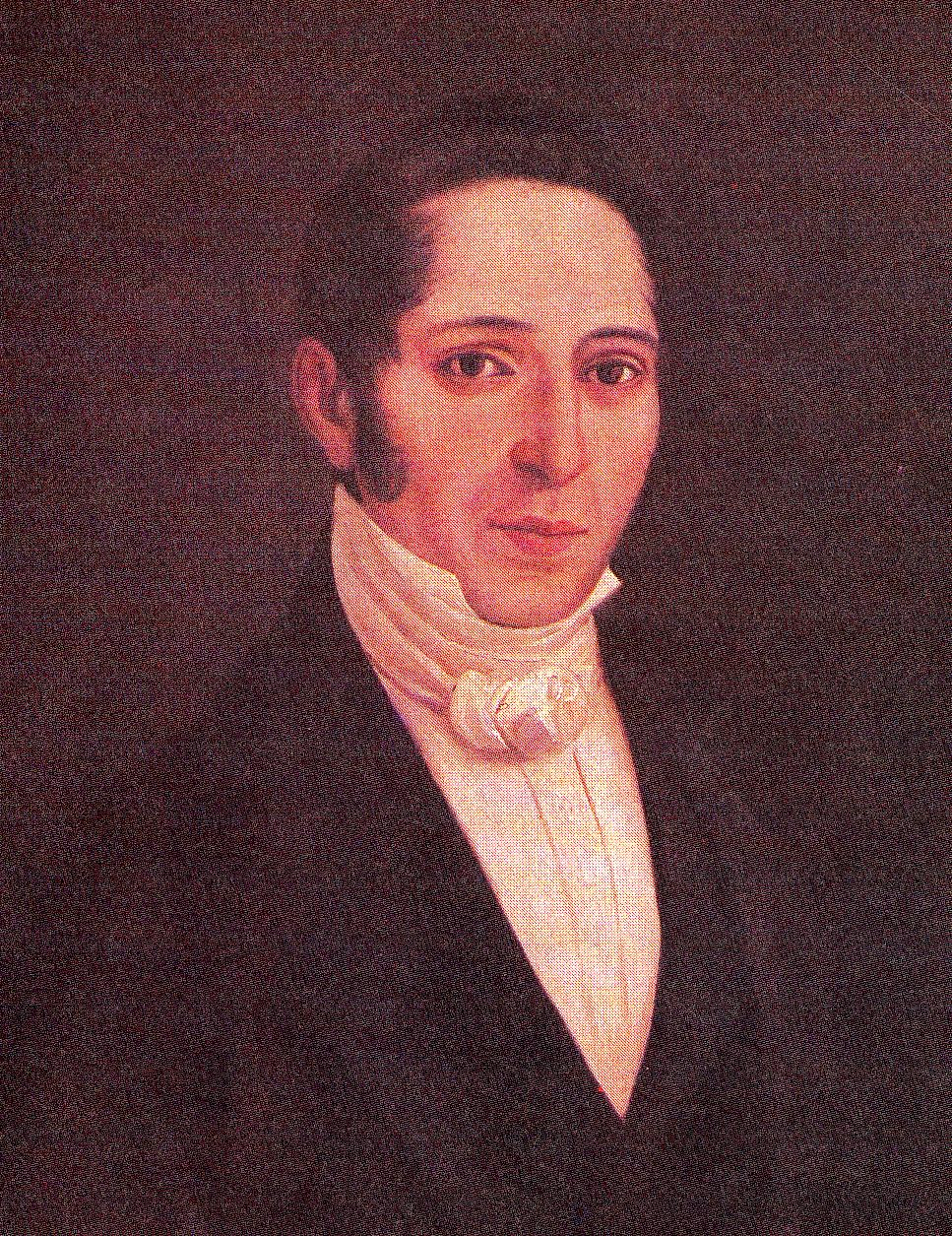 Pintura de Vicente Azuero, polìtico liberal colombiano del siglo XIX y prócer de la Independencia de Colombia.